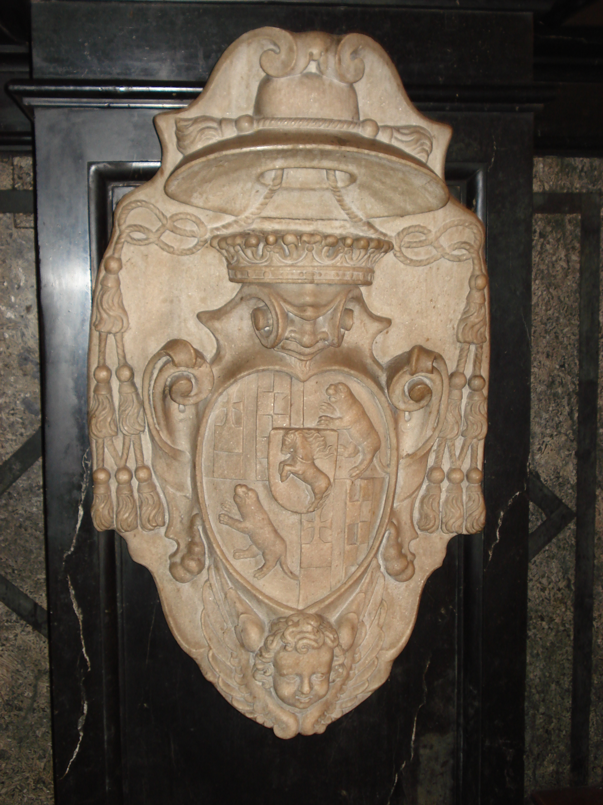 Wien, Dom St. Stephan, Wappen des Bischofs Philipp Friedrich Breuner am Hochaltar